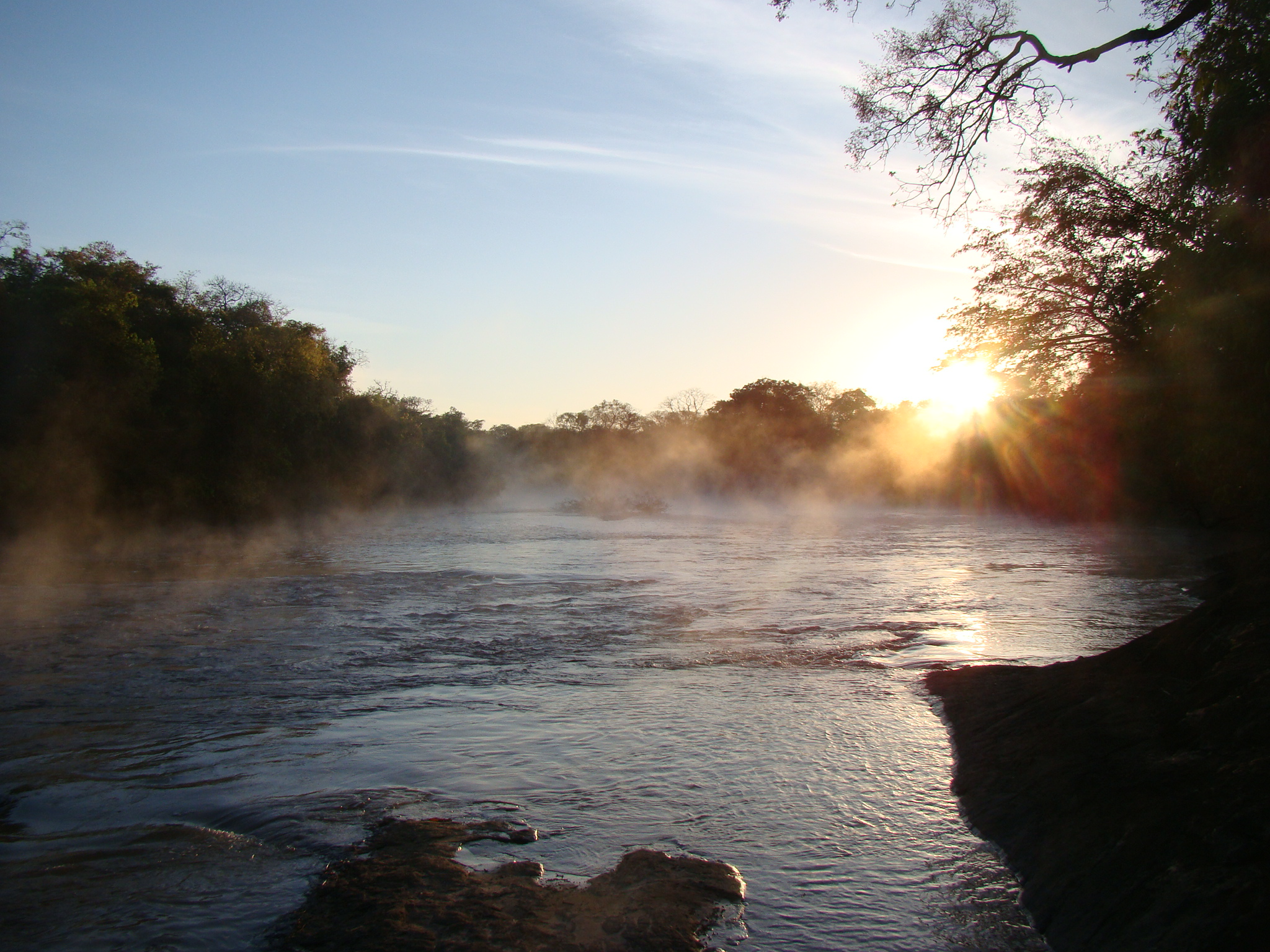 Rio Aquidauana MS - Rancho Pedra Lisa